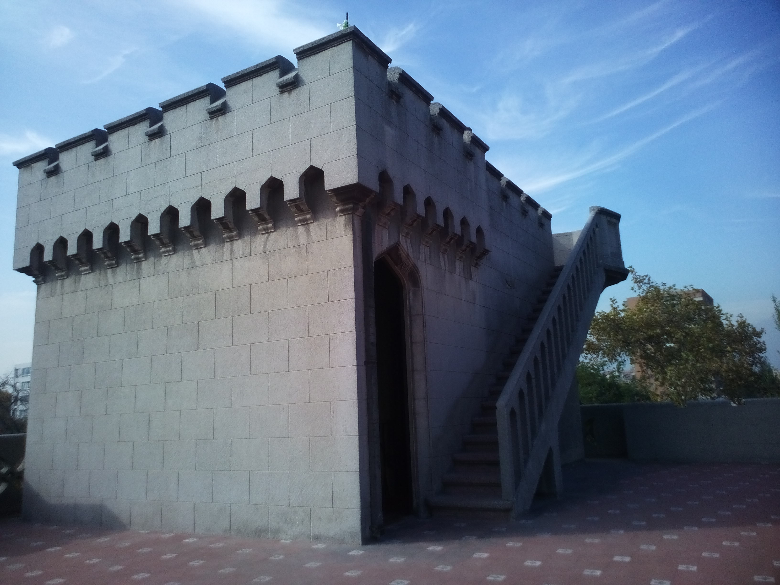 Terraza Castillo Los Jesuitas, Providencia, Chile